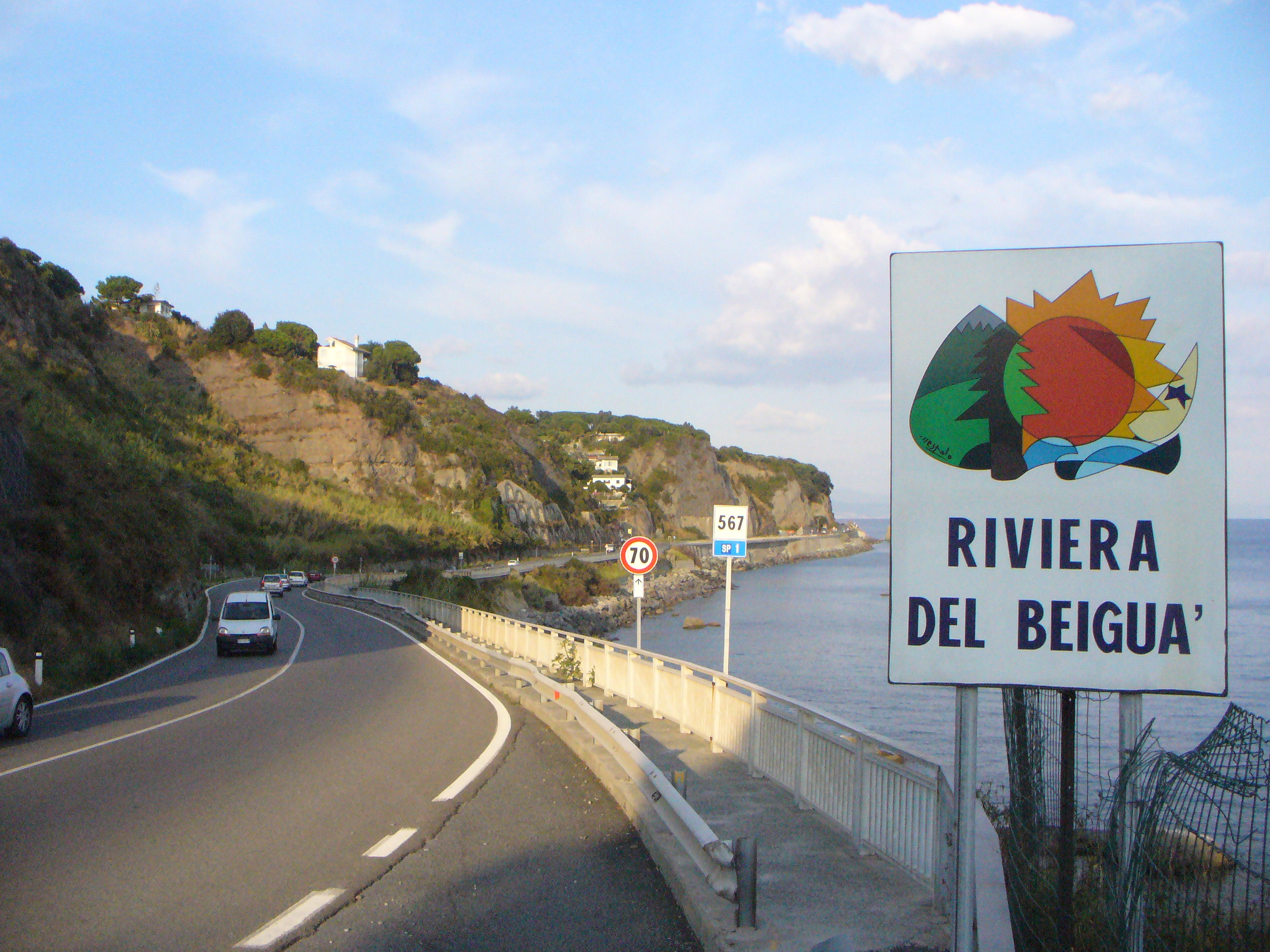 La SS1 via Aurelia all'altezza di Albisola Superiore sulla strada che porta a Celle Ligure nella Riviera del Beigua, Albisola Superiore - Provincia di Savona / Liguria (Italy)